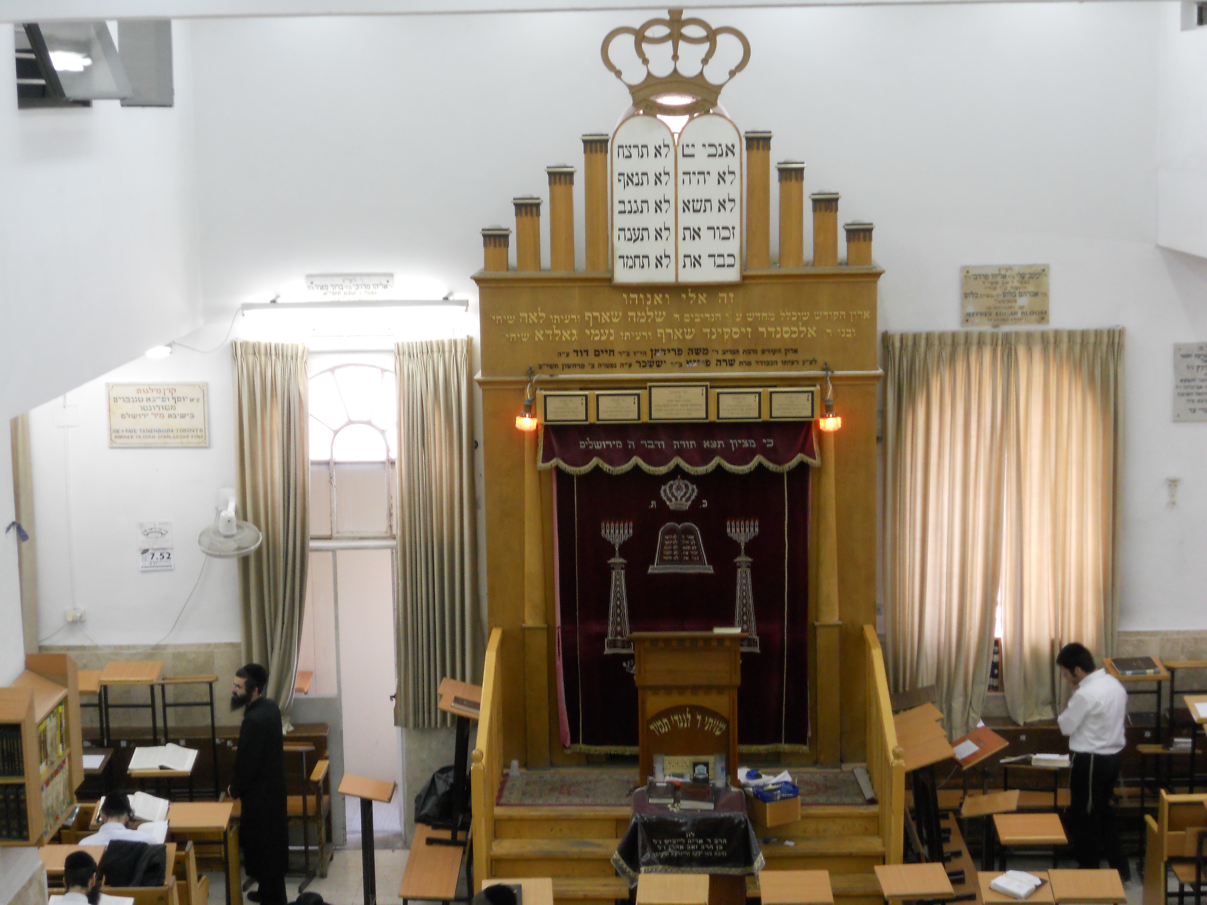 ארון הקודש בישיבת מיר בירושלים בבנין המרכזי ניסן תשע"ב